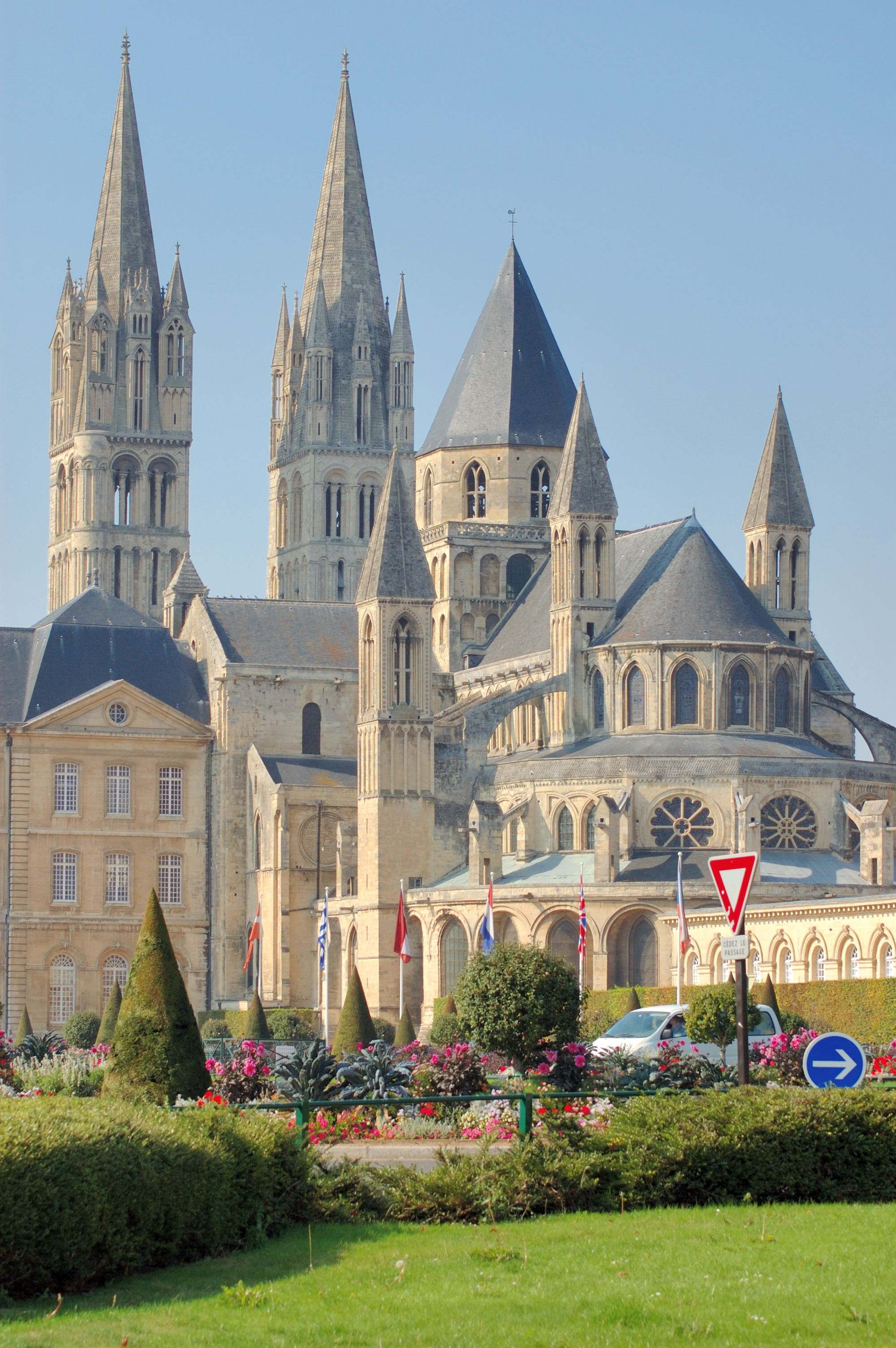 chevet de l'église Saint-Étienne de Caen (Calvados, Basse-Normandie).